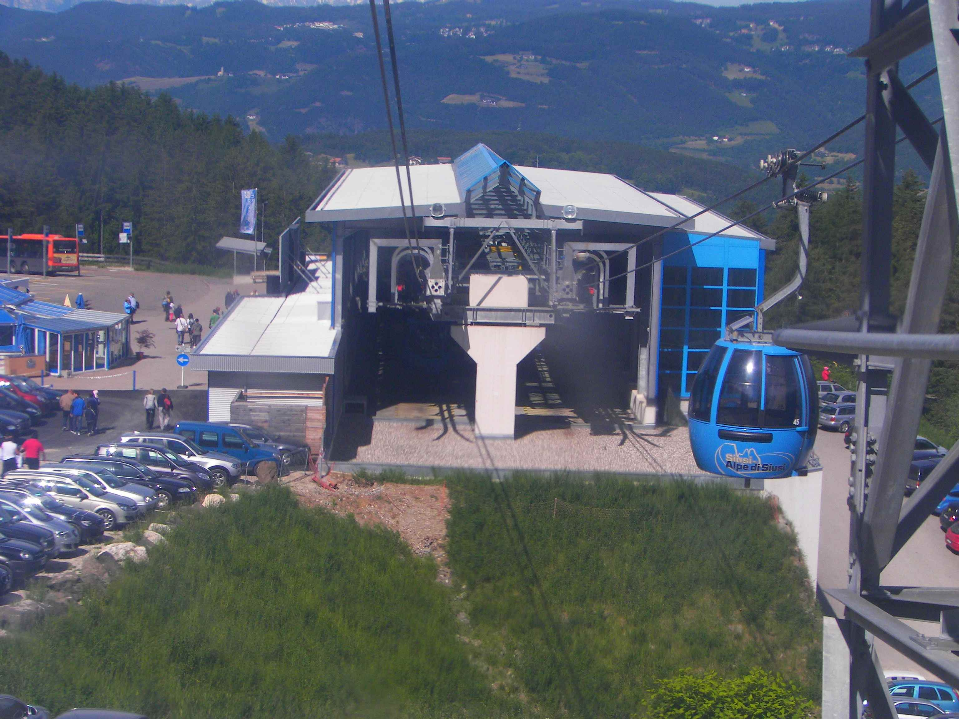 Talstation der Seiser Alm Bahn